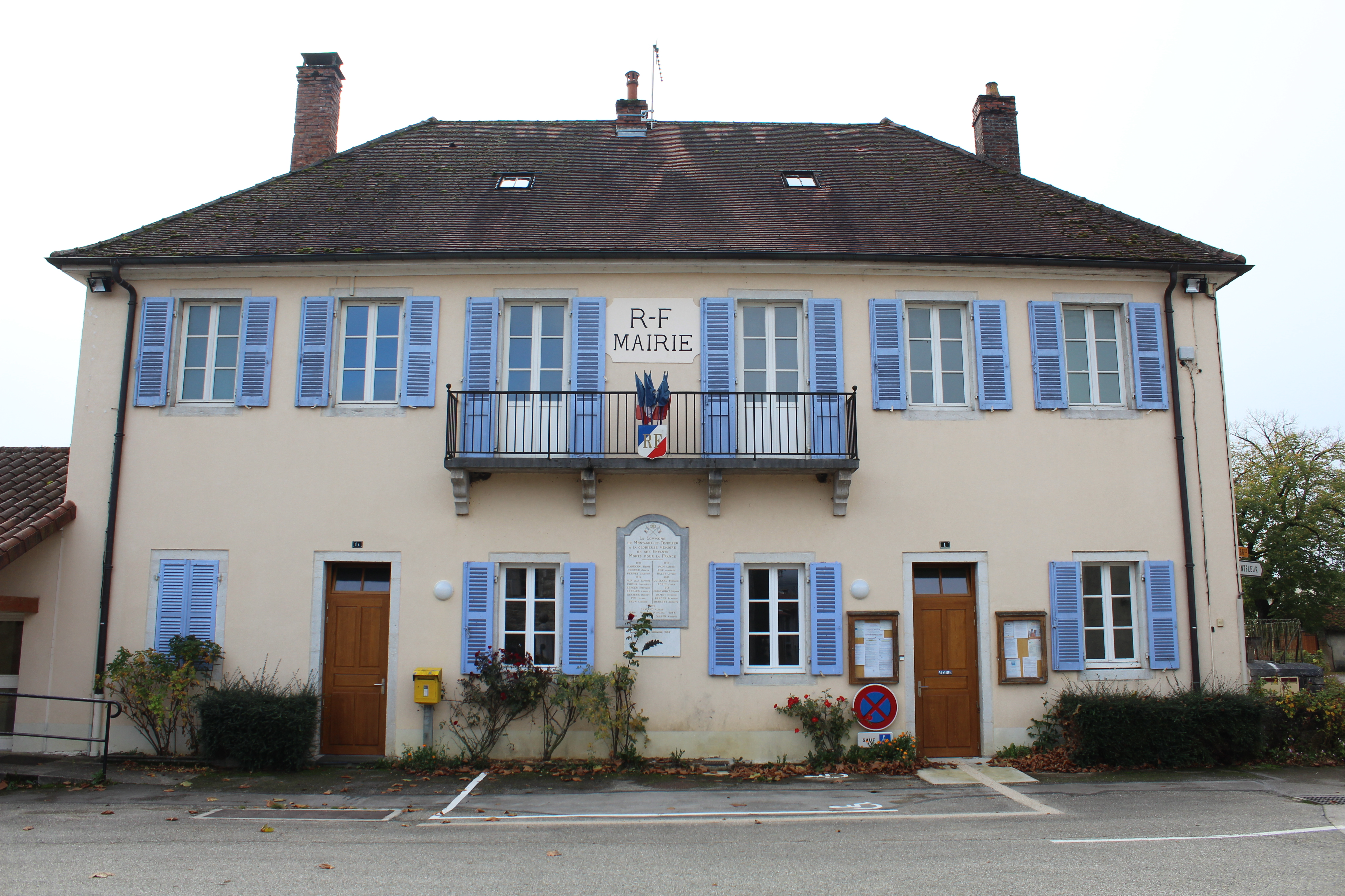 Mairie de Montagna-le-Templier, Montlainsia.